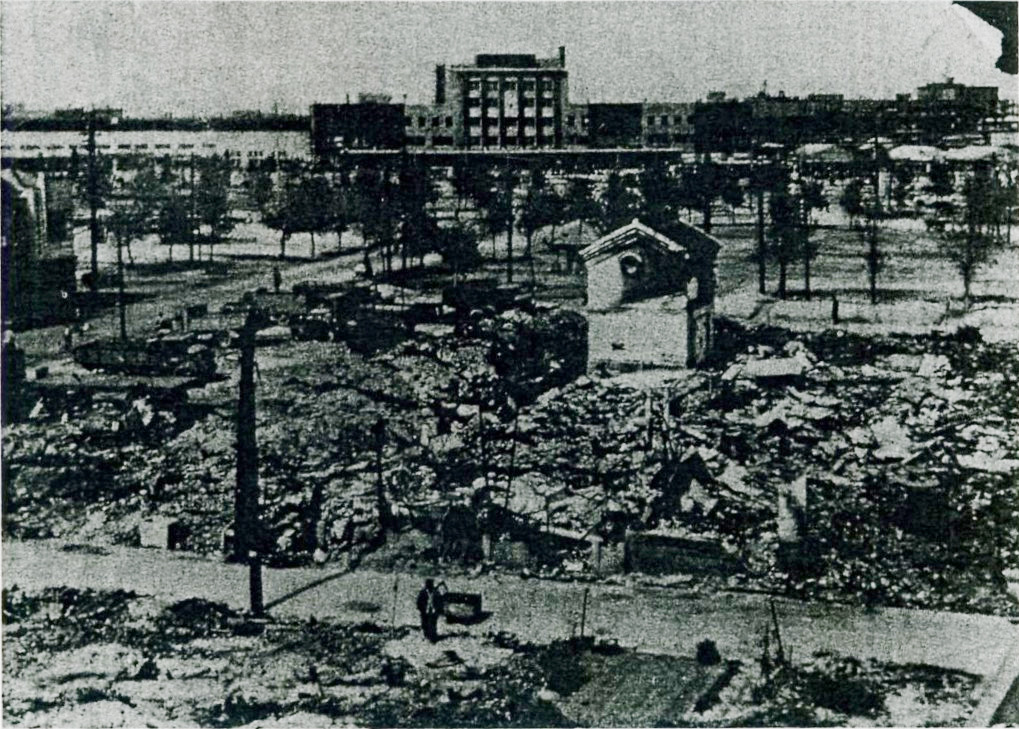 大阪大空襲で焼け野原になった大阪駅前。奥の駅舎は、迷彩色になっている。「写真で見る大阪空襲」によれば、出典は1945年頃に出版され大阪市立図書館にも所蔵されている「変貌ノ大大阪」。